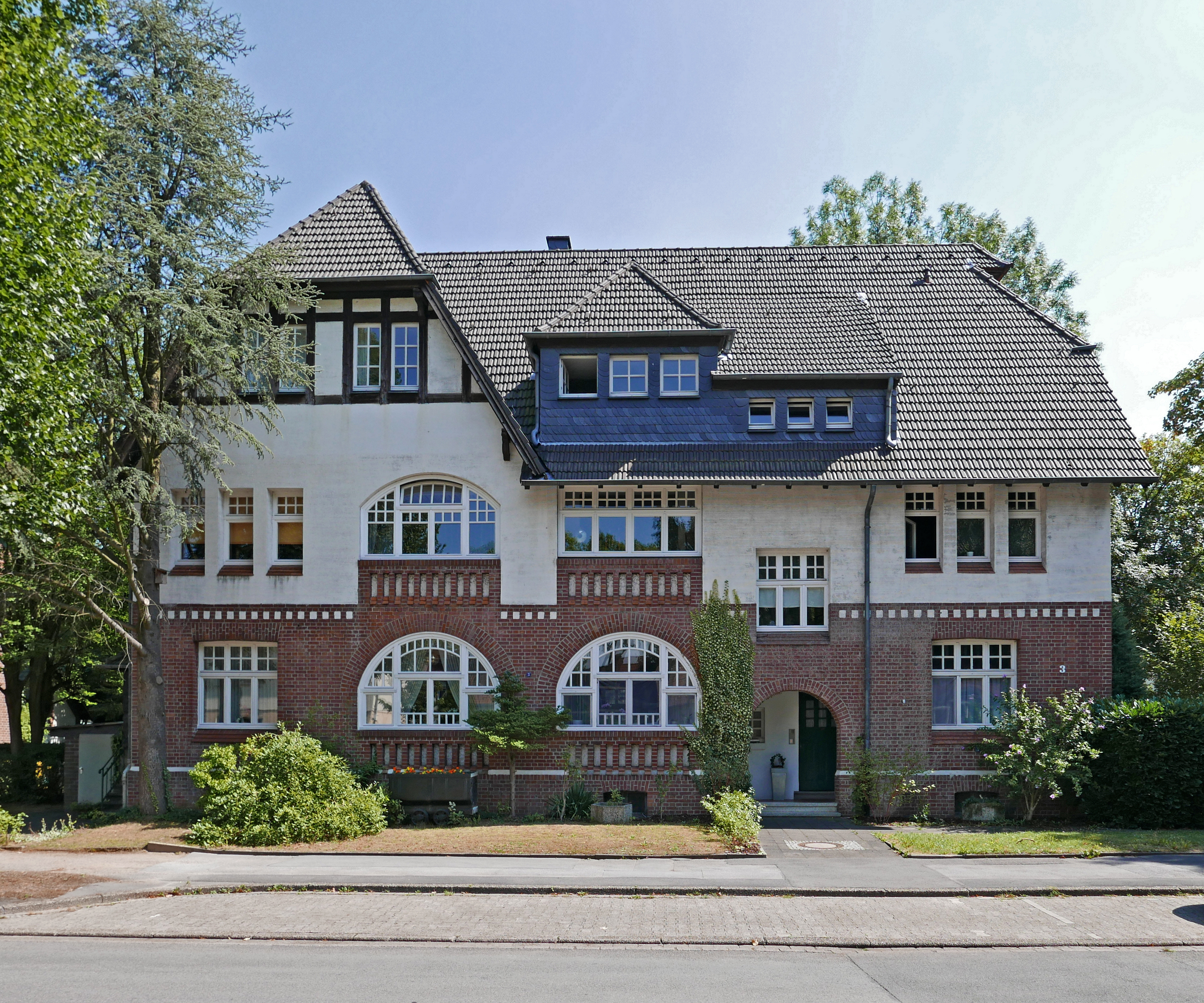 Ruhrgebietsstammtisch August 2018: Kolonie Landwehr